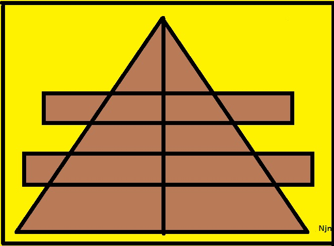 3 వ రకం - పులిజూదం